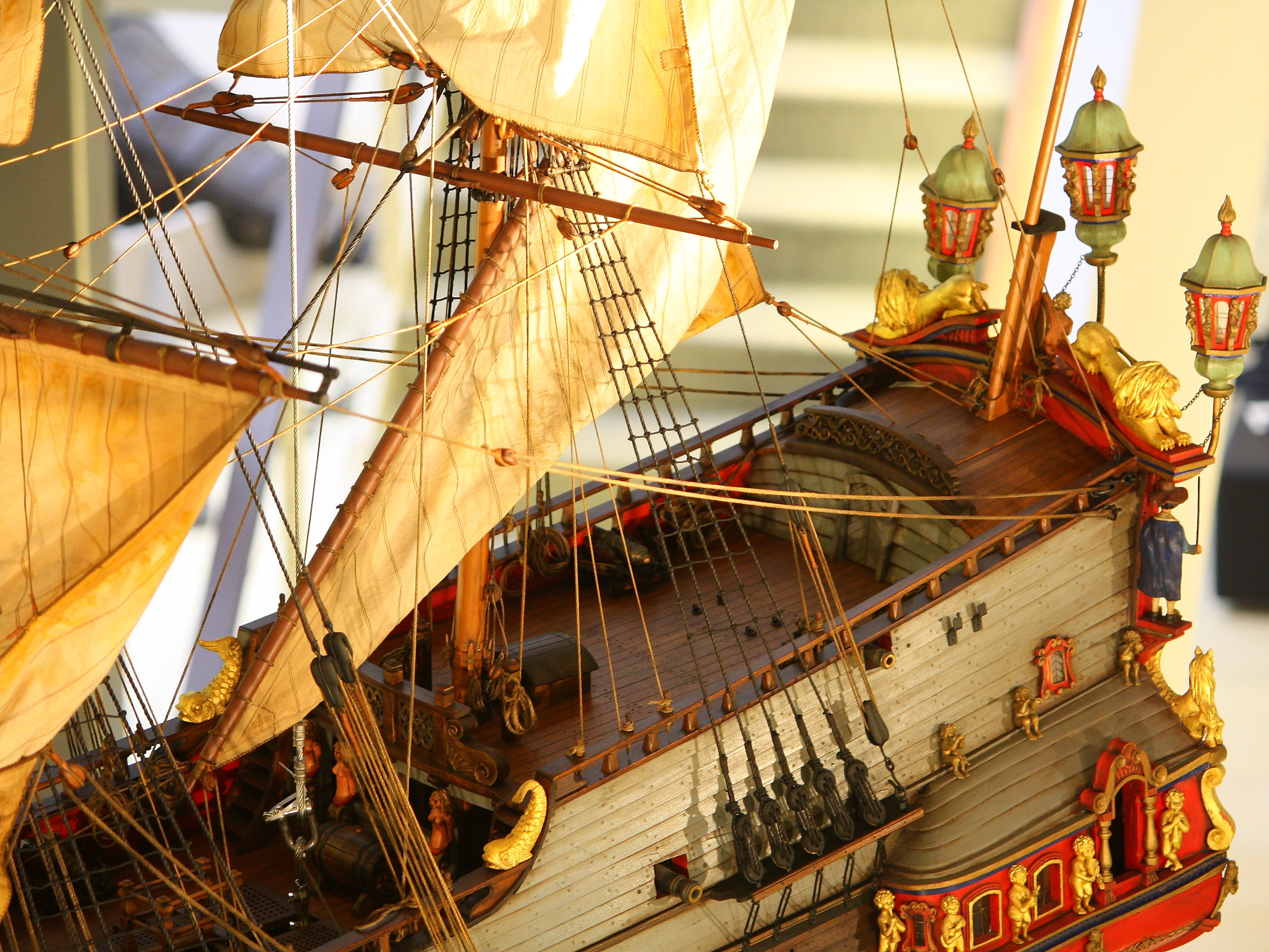 Modell des hamburgischen Konvoyschiffes Leopoldus Primus - Detailansicht Poop und Kampanje